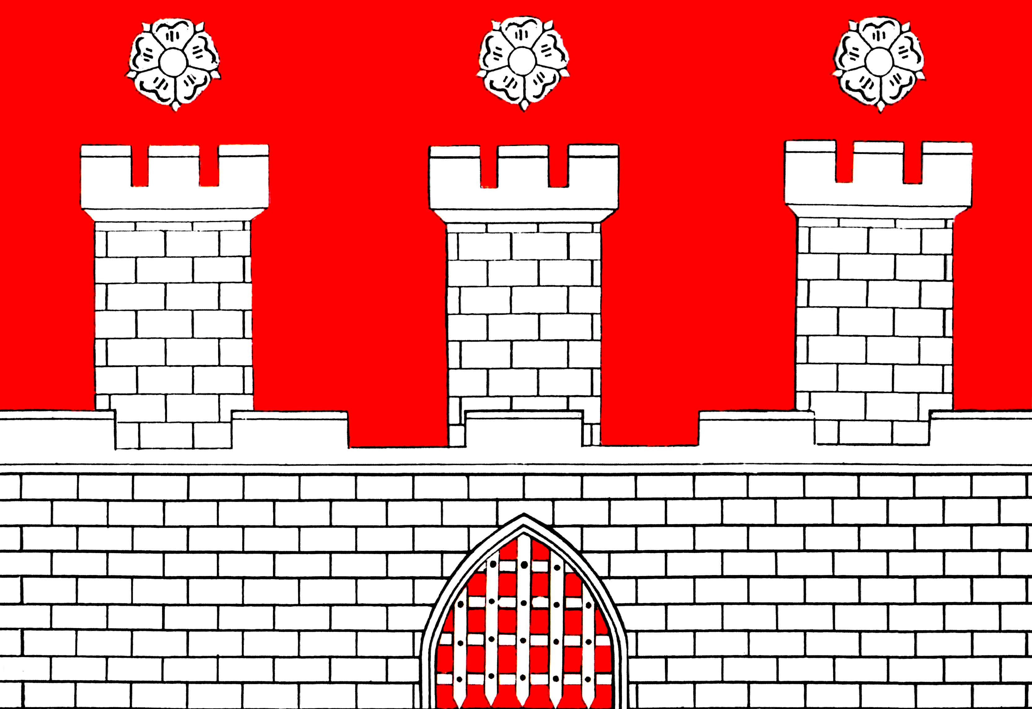 Vlajka obce Pohořelice (okres Brno-venkov)